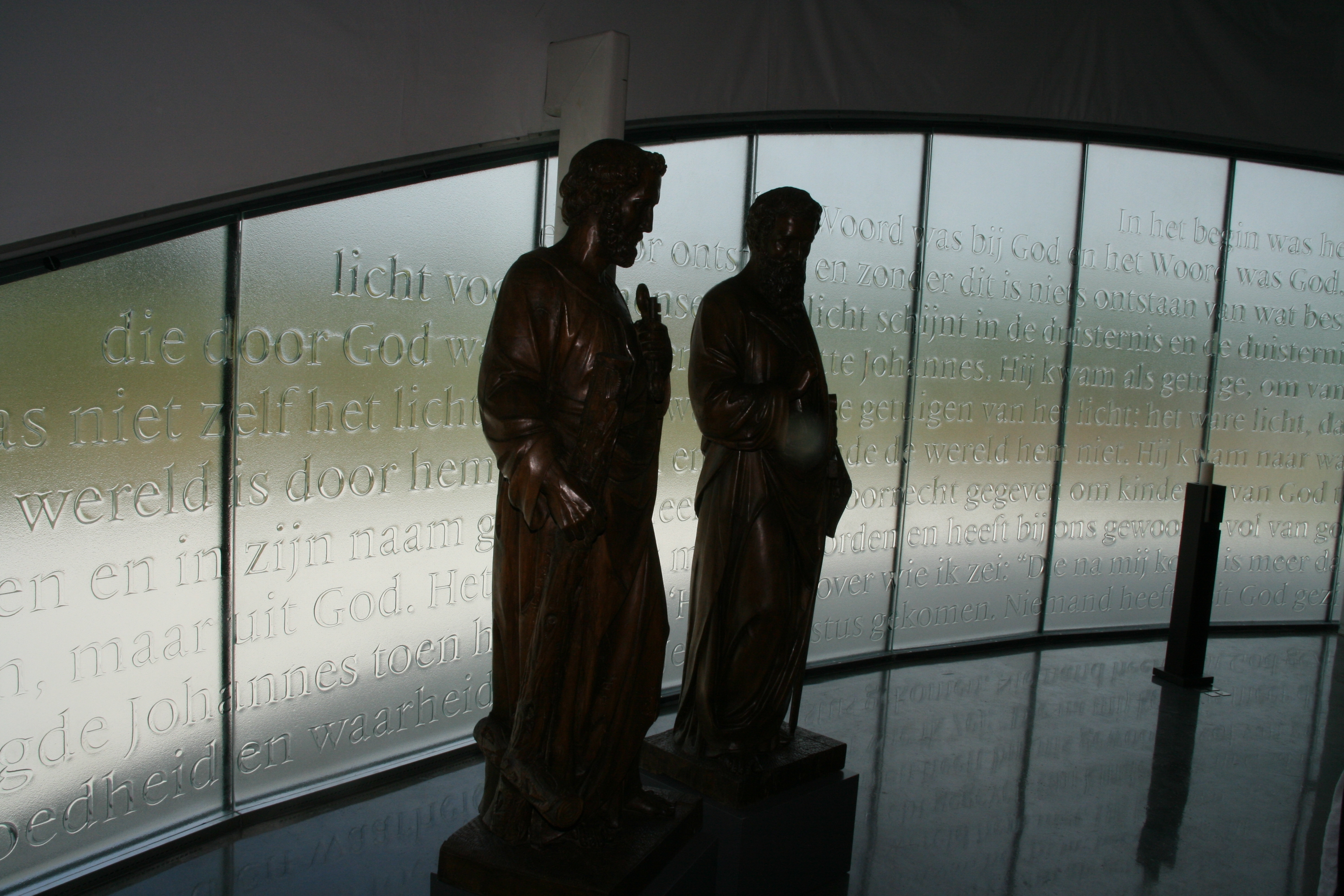 Petrus en Pauluskerk Maassluis, details raam westzijde